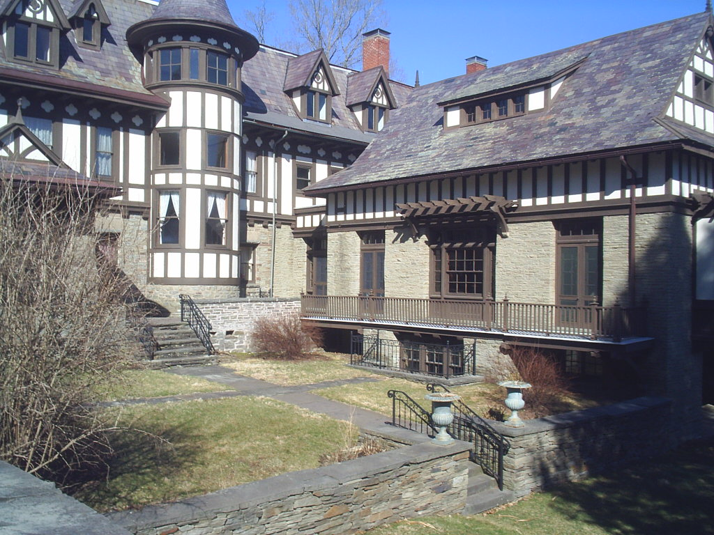 M3367S-4504